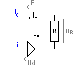 Circuit électrique simple avec une LED, une résistance et une pile